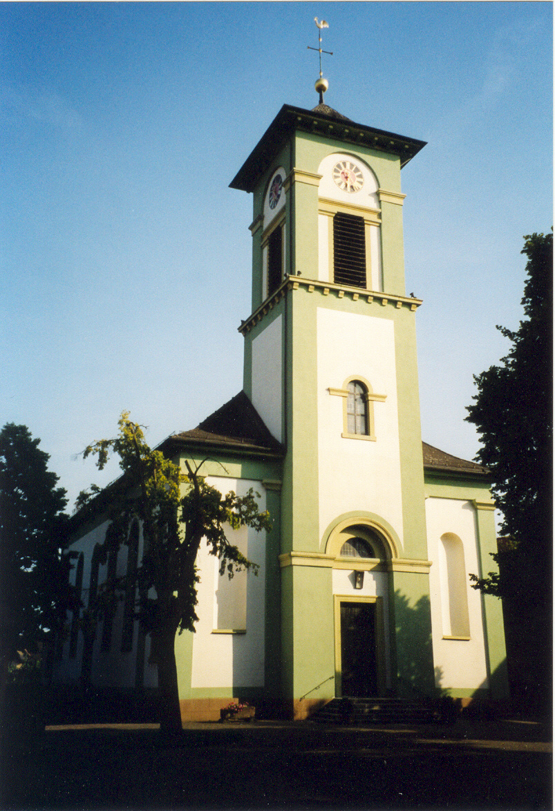 Kürzell besitzt eine der schönsten badischen Kirchen im klassizistischen Weinbrenner-Stil. Erbaut 1829-31 von Weinbrenner-Schüler Hans Voss (auch die Gotteshäuser von Ichenheim, Ortenberg, Münchweier und Urloffen stammen von ihm) besitzt die Kirche dank durchaus reicher Detailarbeit und einem niedrigen und lustig geschwungenen Turmdach eine beinahe lieblich-barocke Ausstrahlung - dieser Aspekt kürt sie unter die ungewöhnlichsten Kirchen im eigentlich für eine kraftvolle, monumentale Wirkung bekannten Weinbrenner-Stil.